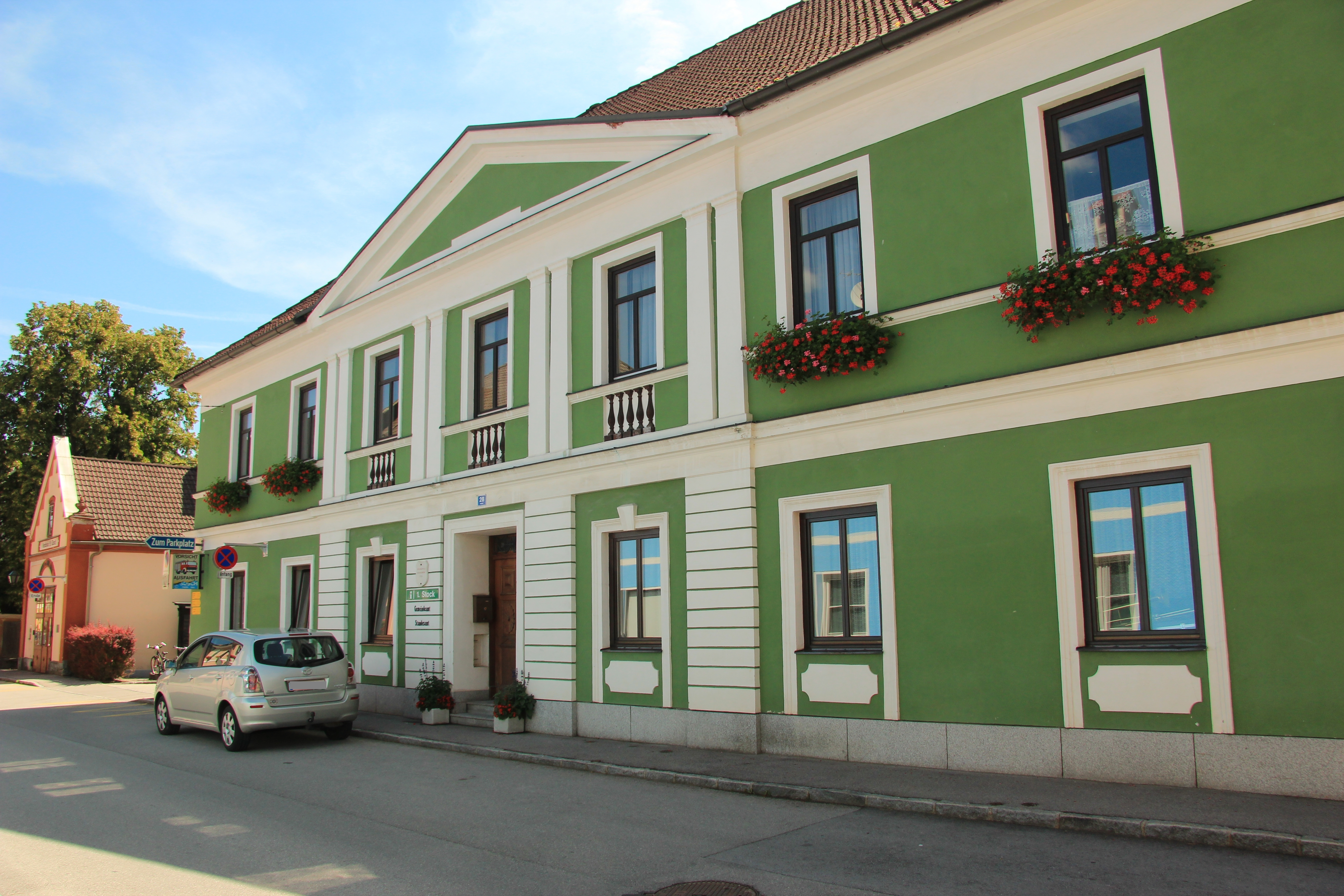 Gemeindeamt in Türnitz